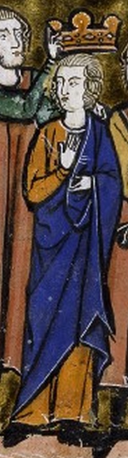 Couronnement de Baudouin III